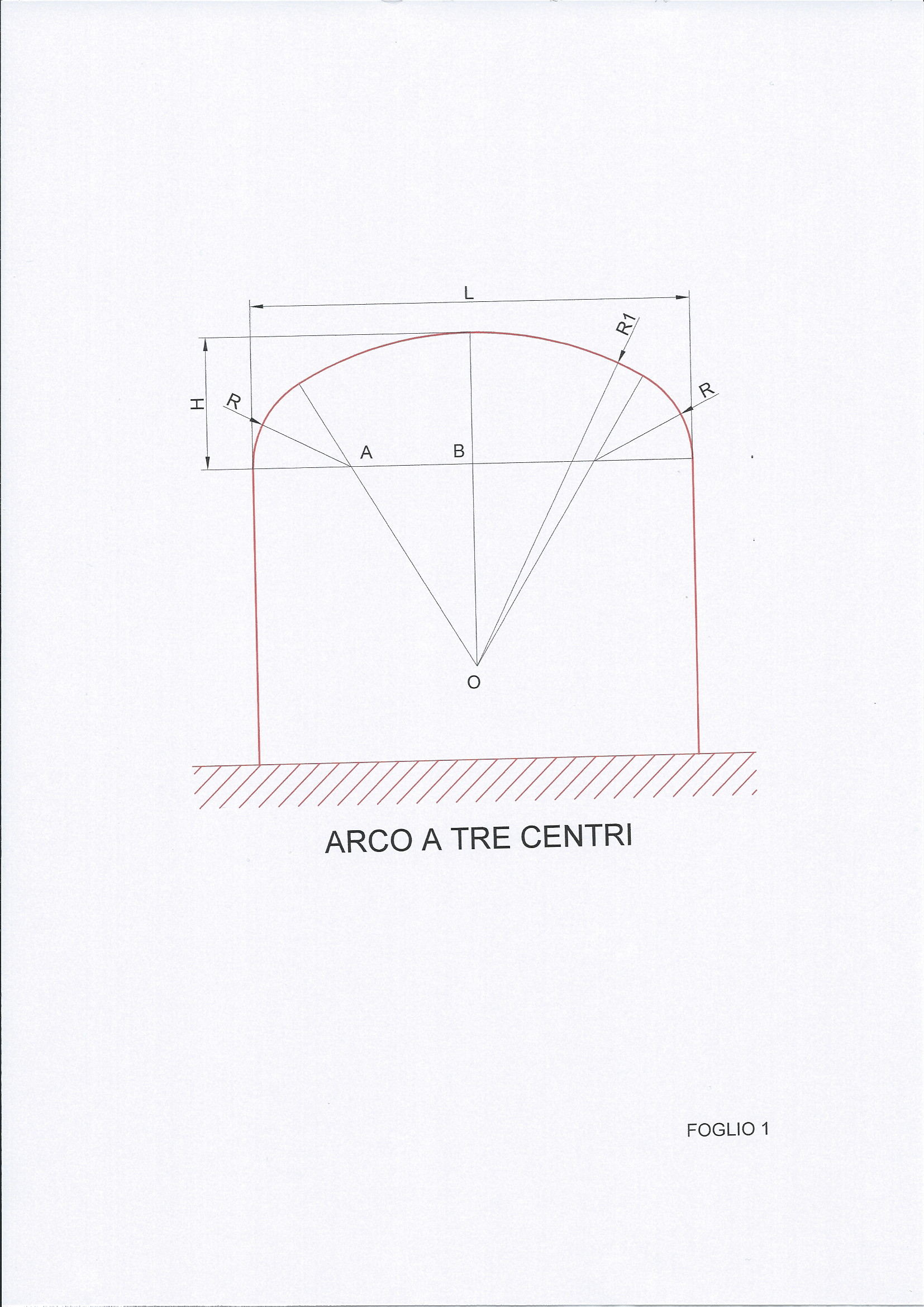 Arco a tre centri